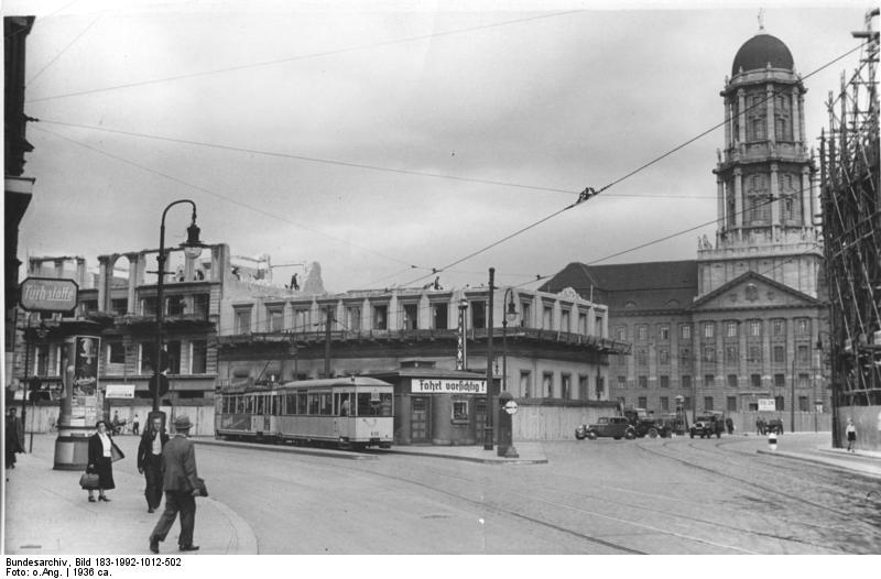 Molkenmarkt: Freilegung vom Stadthaus (um 1936)